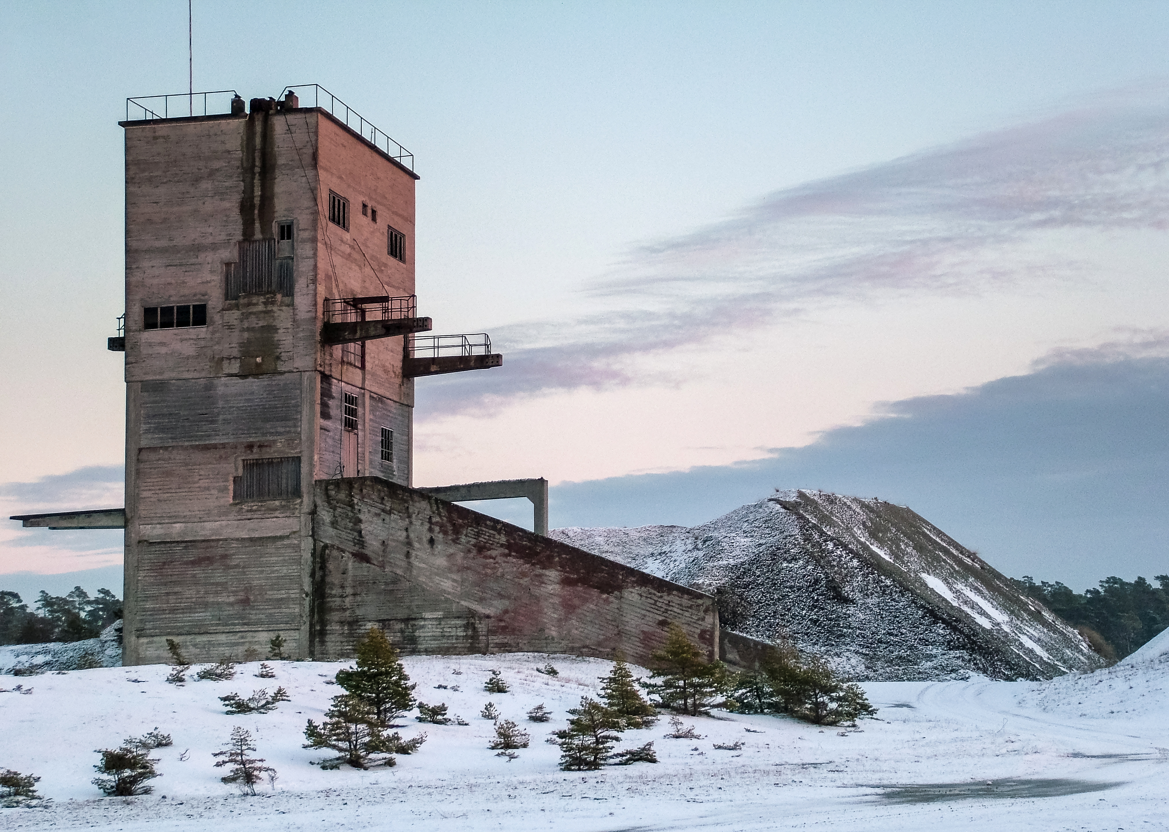 Fabrikstornet på Furillen, Gotland, Sverige